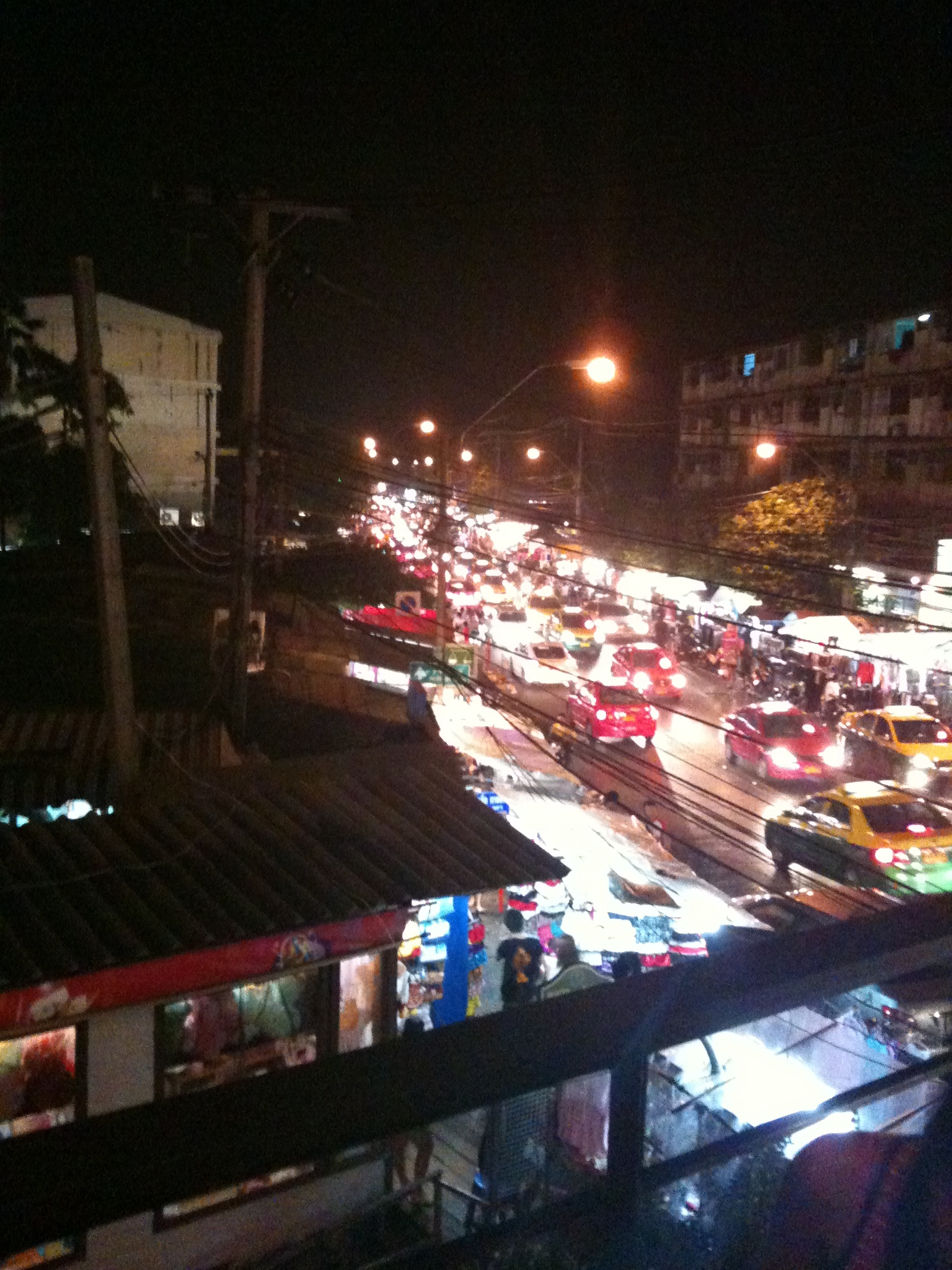 Huai Khwang at night